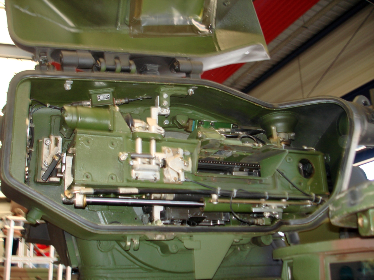 Waffenträgergehäuse der MK 20 Rh 202 im Schützenpanzer Marder 1A3